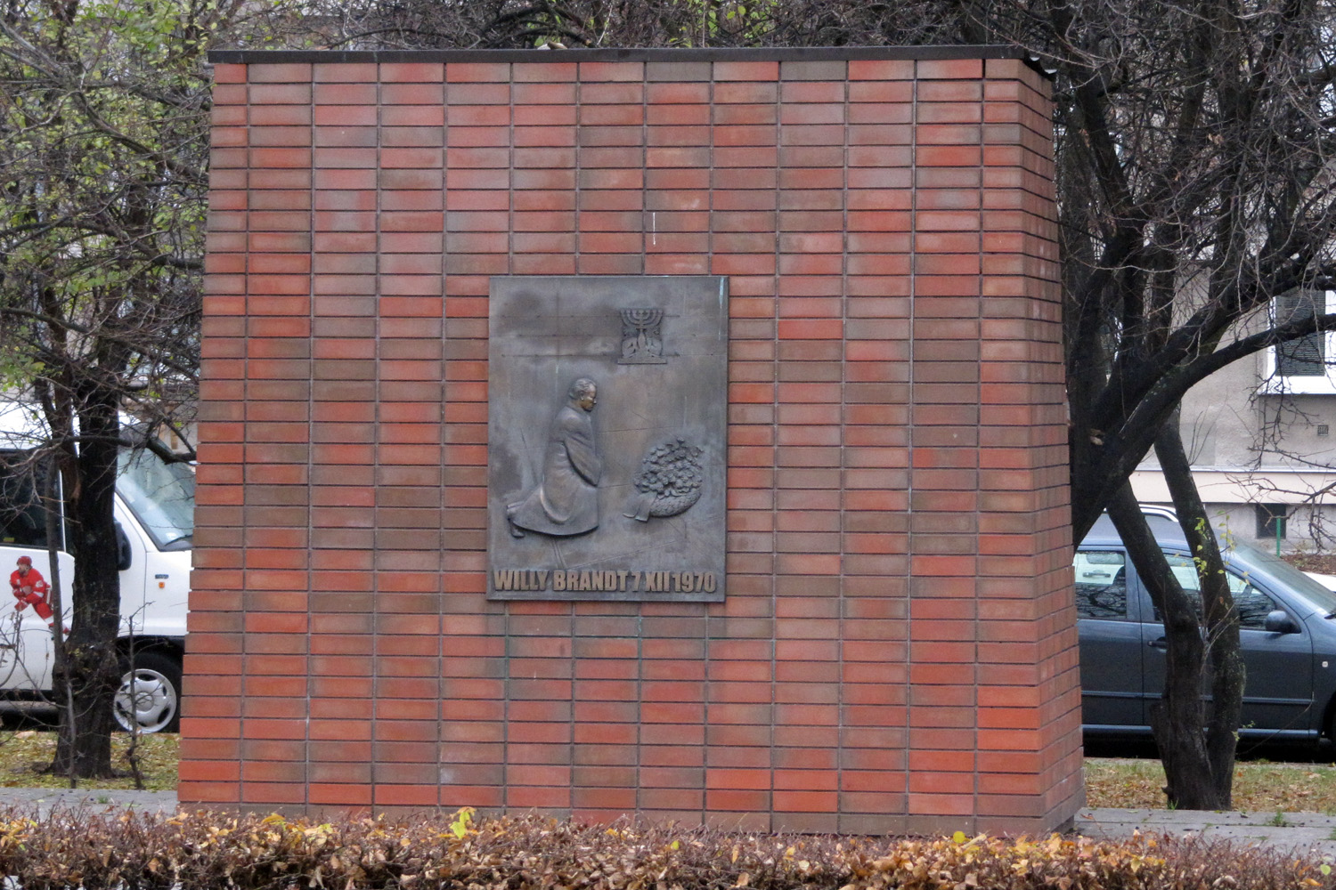 Denkmal für Willy Brandts Kniefall